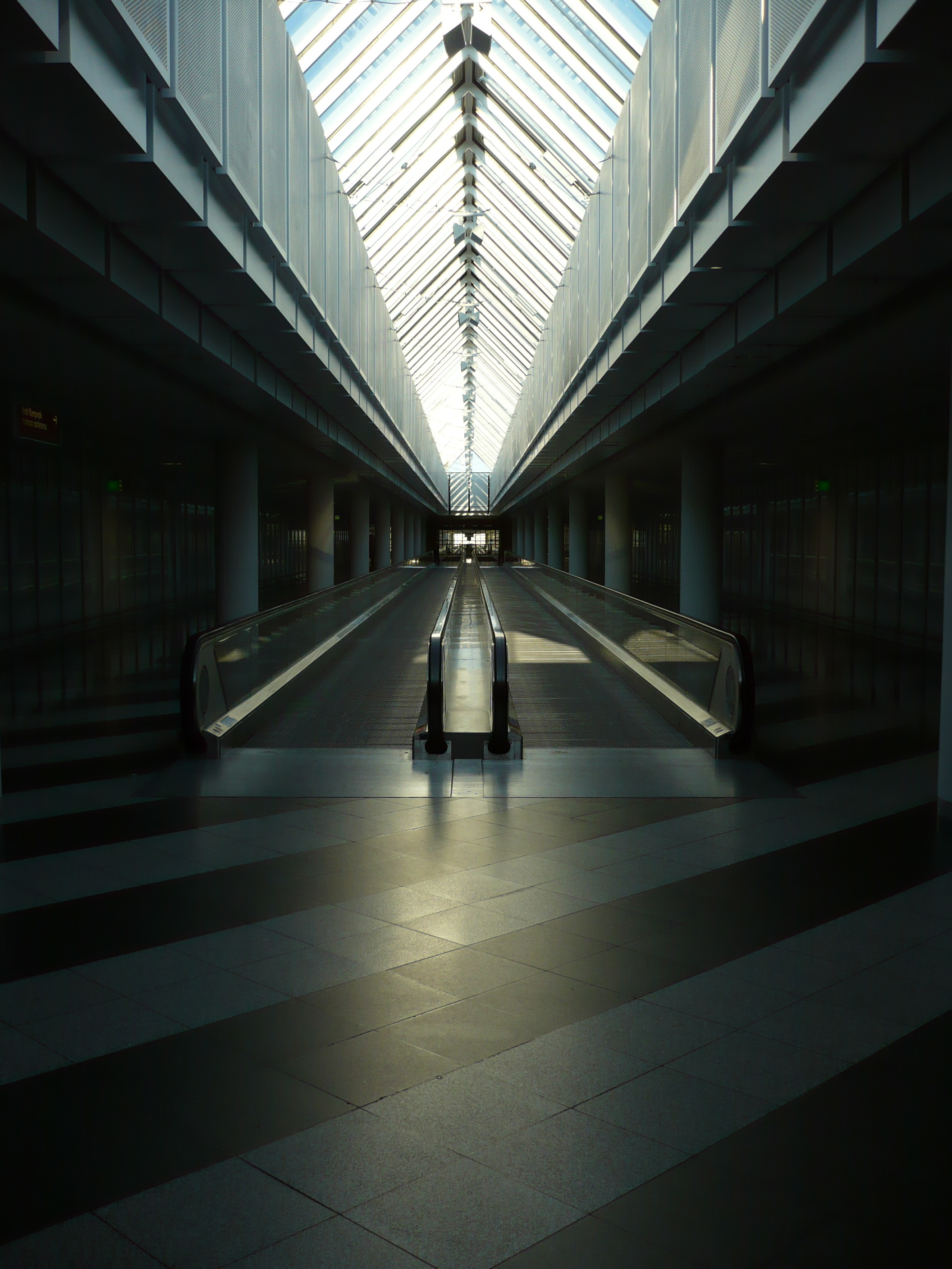 Fahrsteig zwischen Terminal 1 A und F am Flughafen München